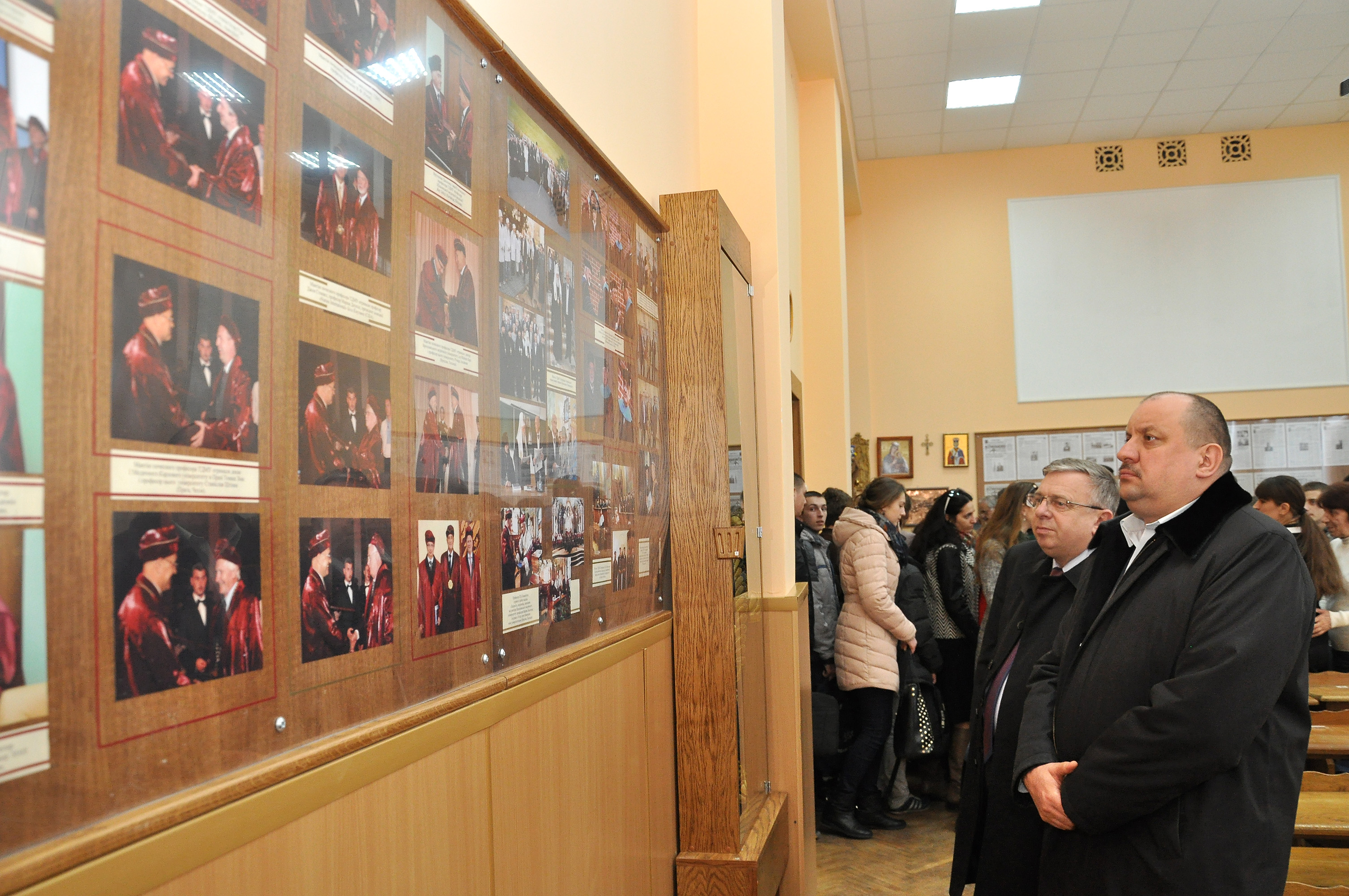 Відкриття Музею Леоніда Якимовича Ковальчука в Тернопільському державному медичному університеті імені І. Я. Горбачевського. Виставку світлин оглядають директор Кременецького медичного училища Петра Мазур та невідомий.